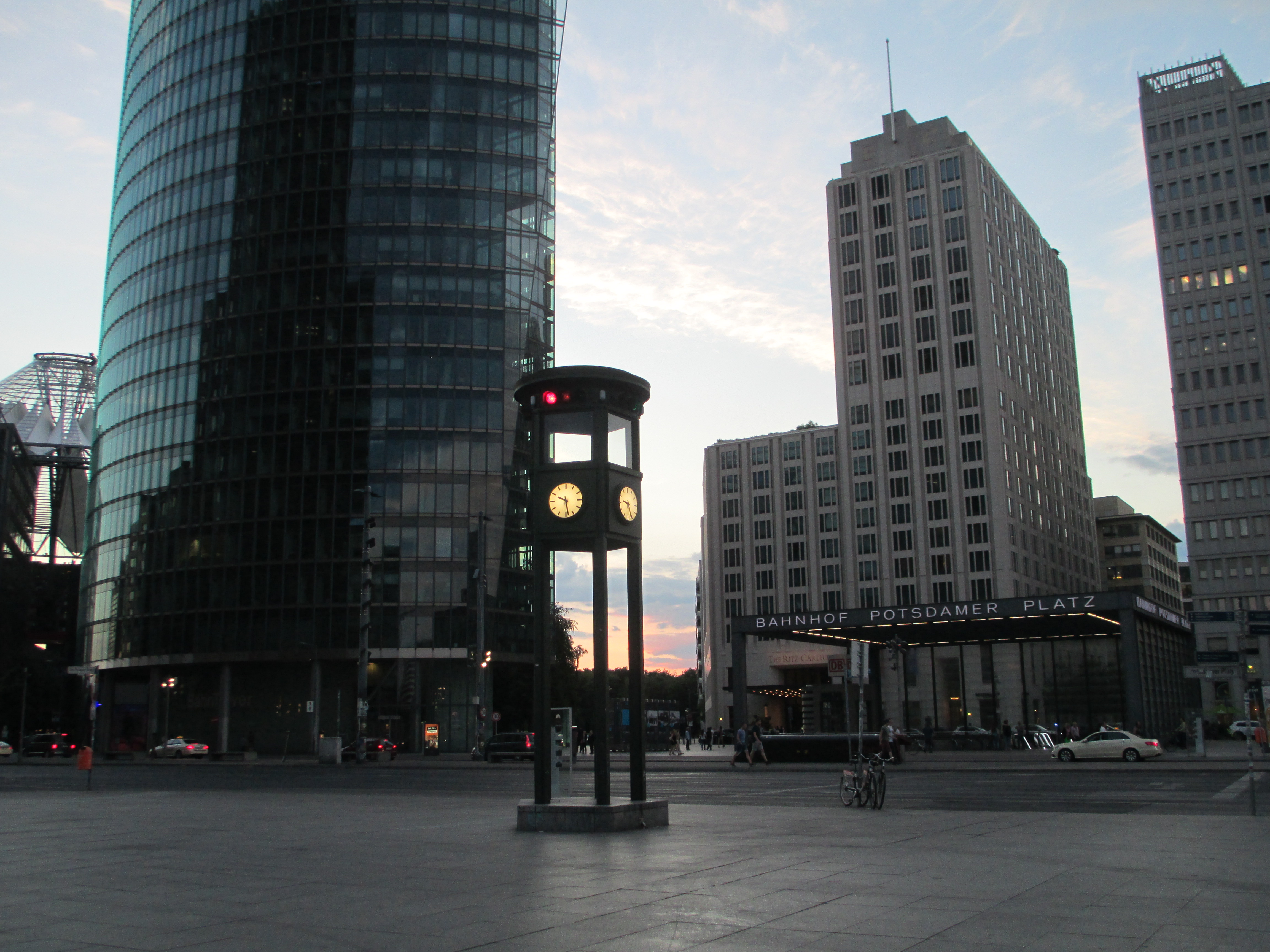 ה"רמזור" בכיכר פוטסדאם